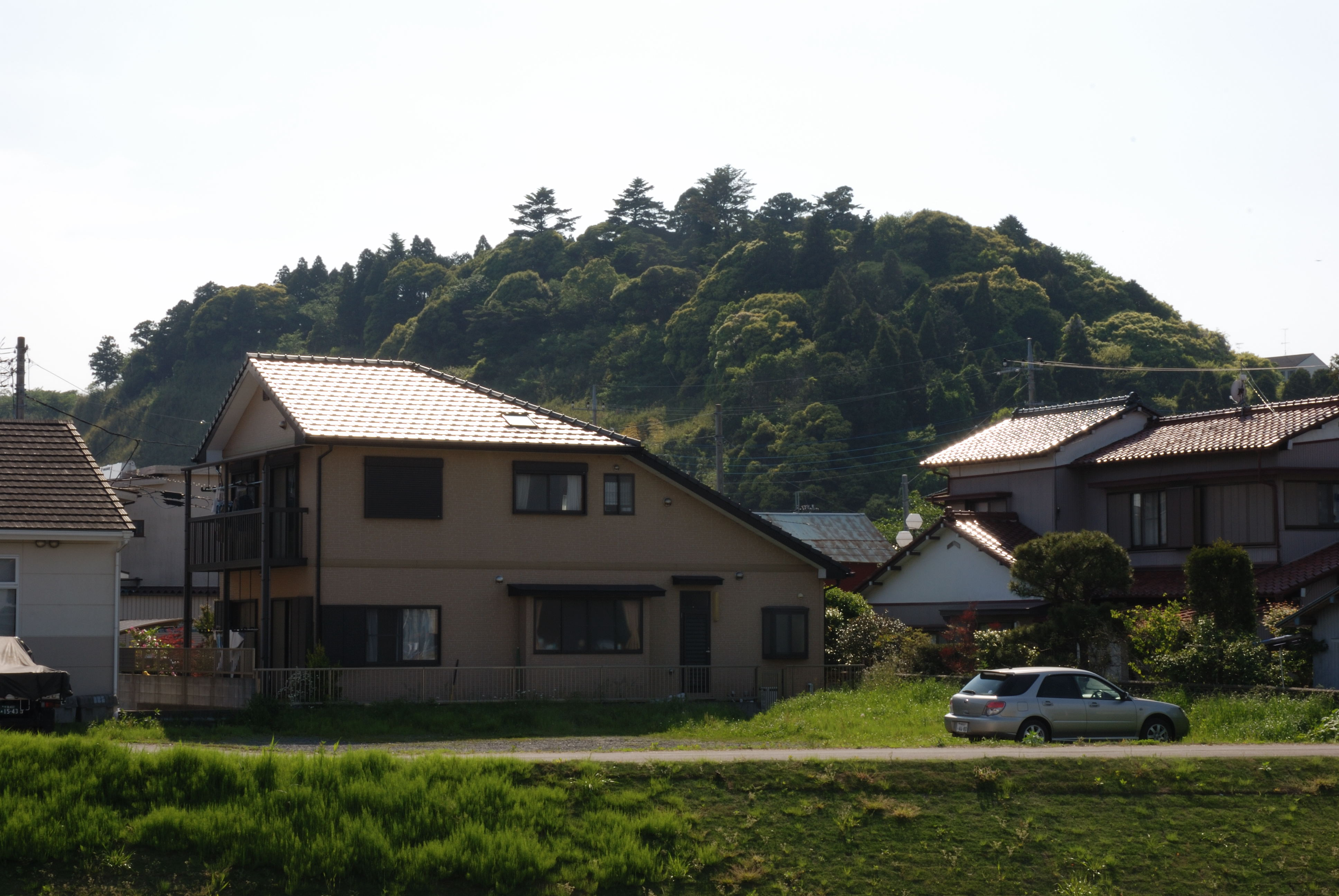 Naruto castle